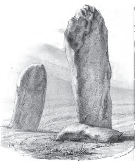 Corsu: U Frati è a Sora, disegnu da Mérimée.